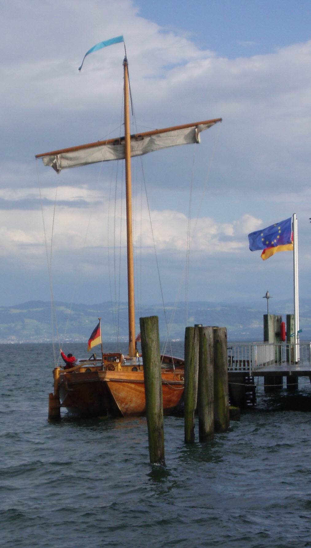 Lädinennachbau am Schiffsanleger in Immenstaad